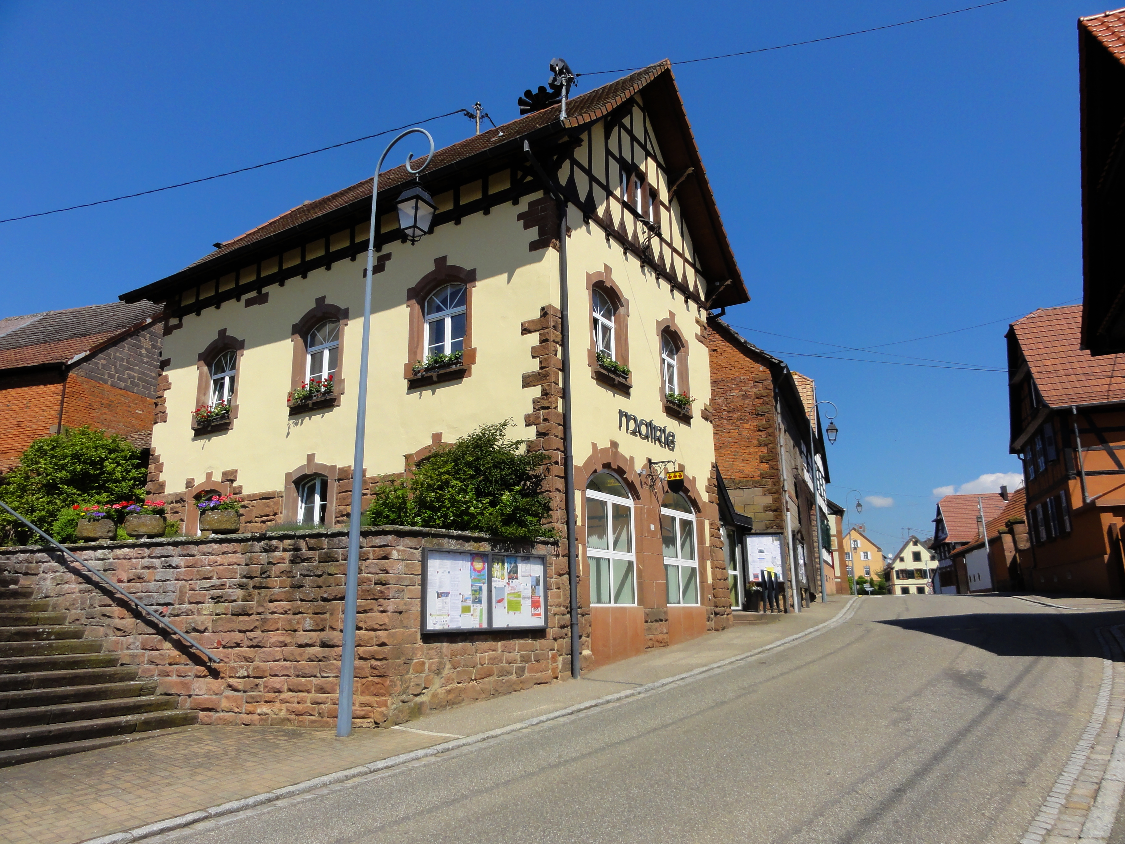 Alsace, Bas-Rhin, Engwiller, Mairie (1900), 14 rue Principale. .